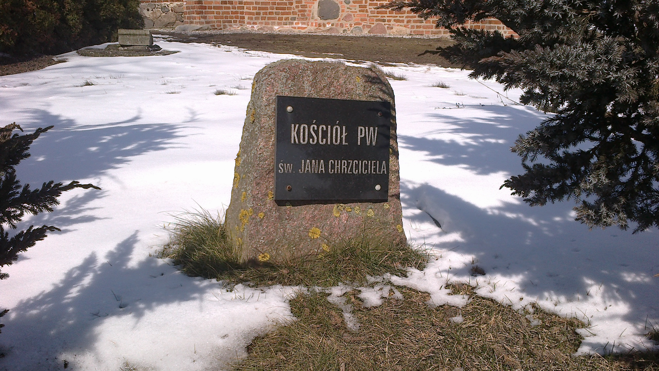 Tablica w Janikowie